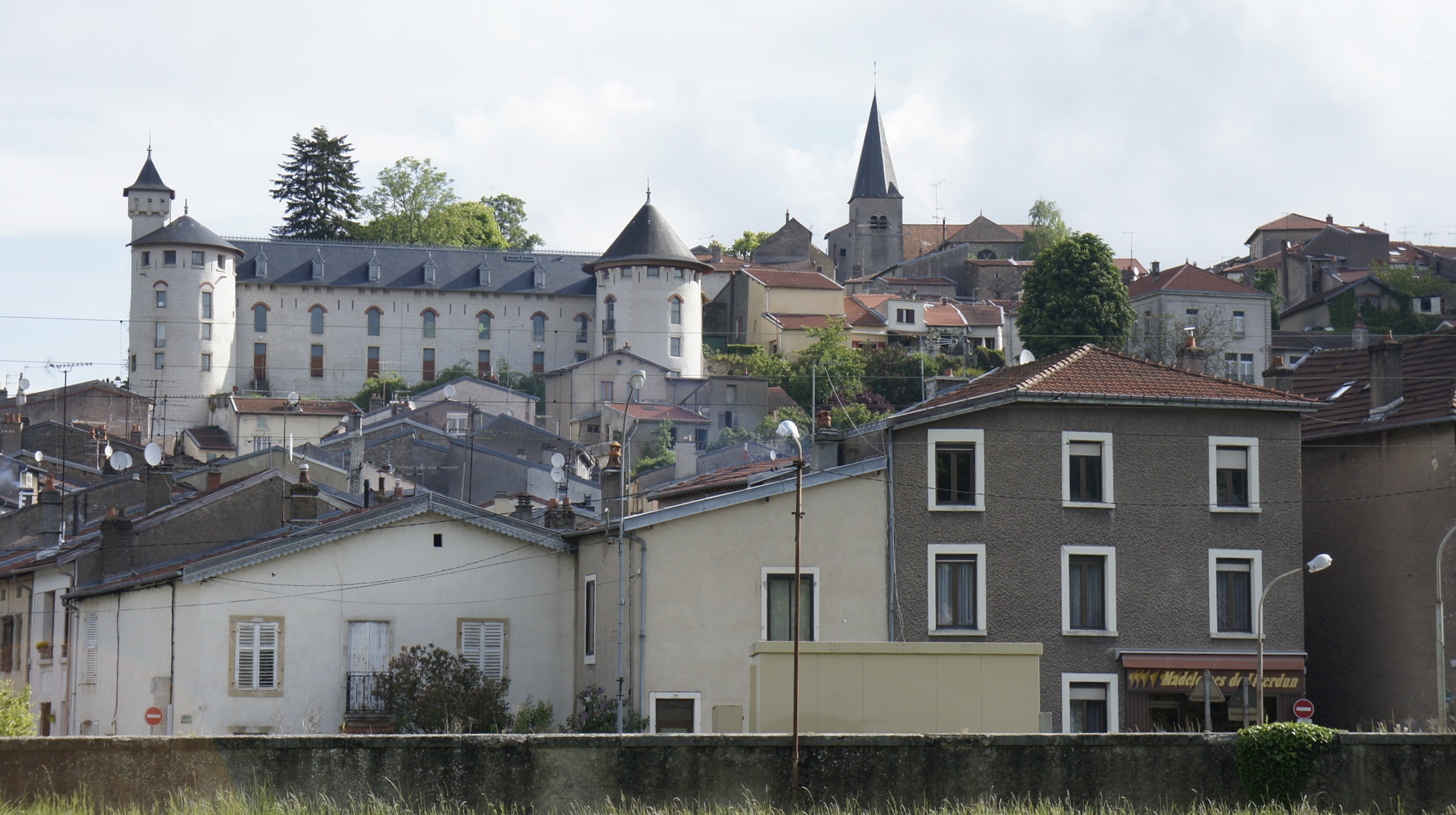 Le château Corbin et l'église à Liverdun vue du bas du village .